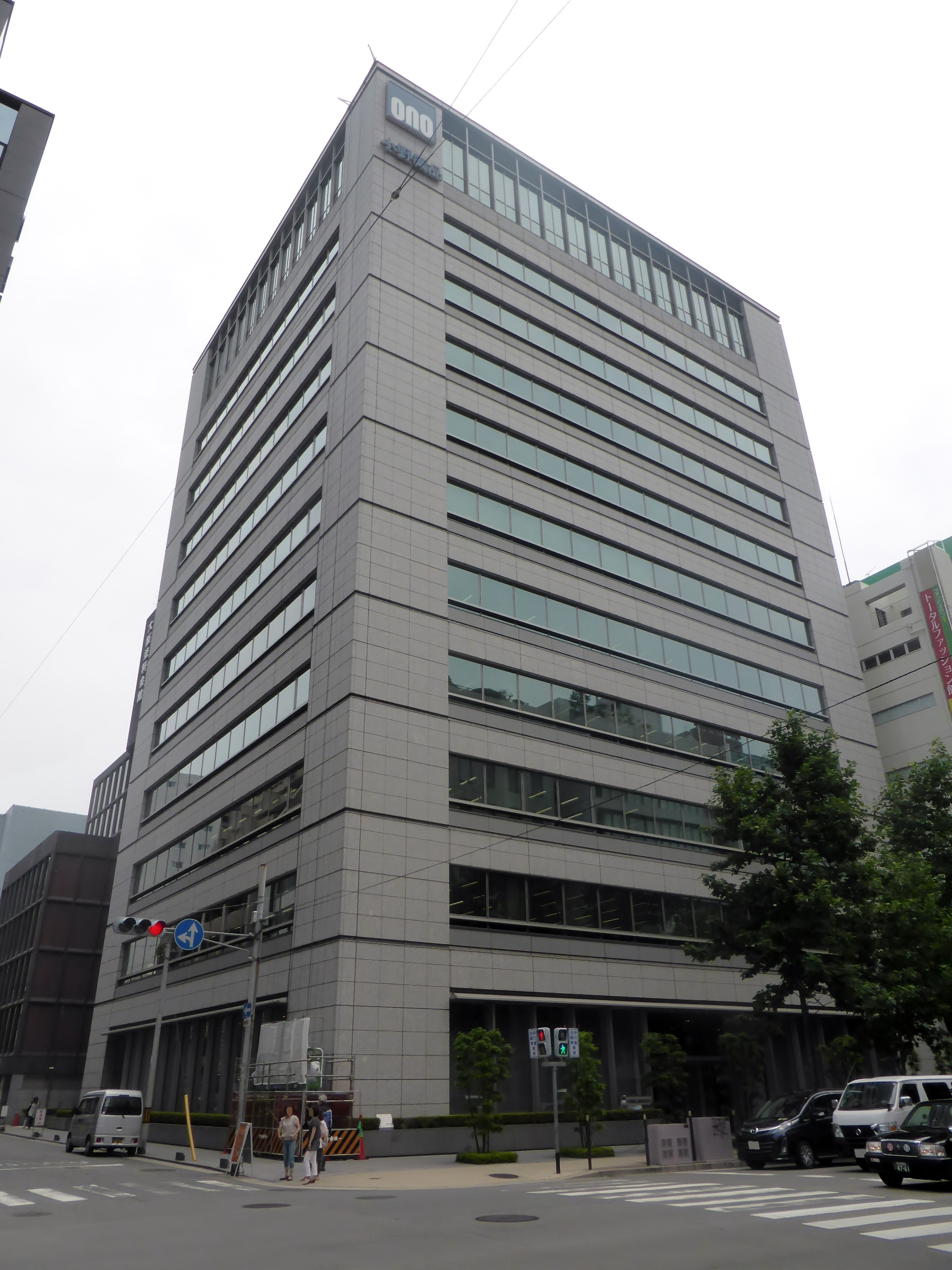 小野薬品工業株式会社本社を撮影。